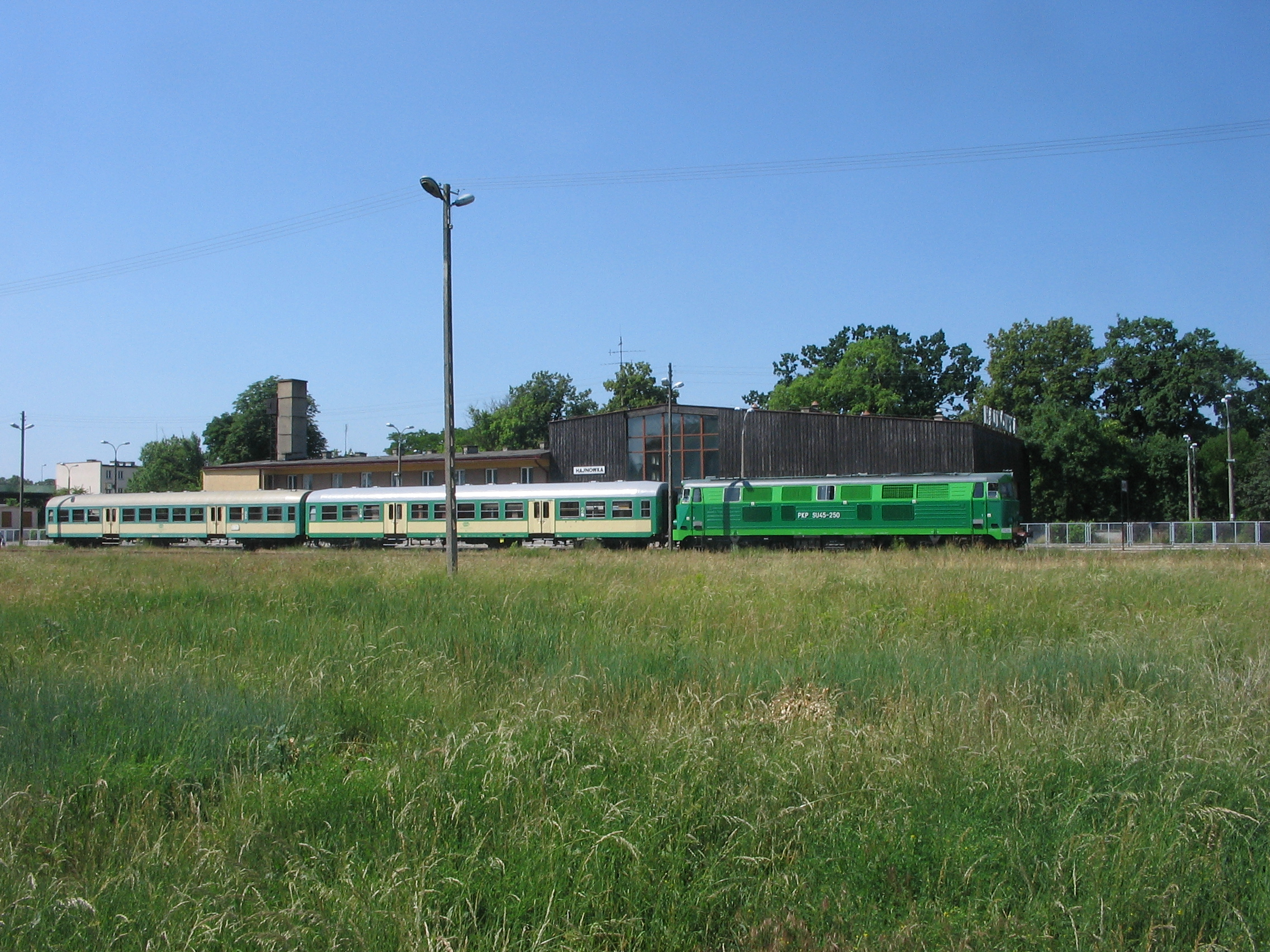 lok. SU45-250 z dwoma wagonami 2 kl. 120A na stacji Hajnówka